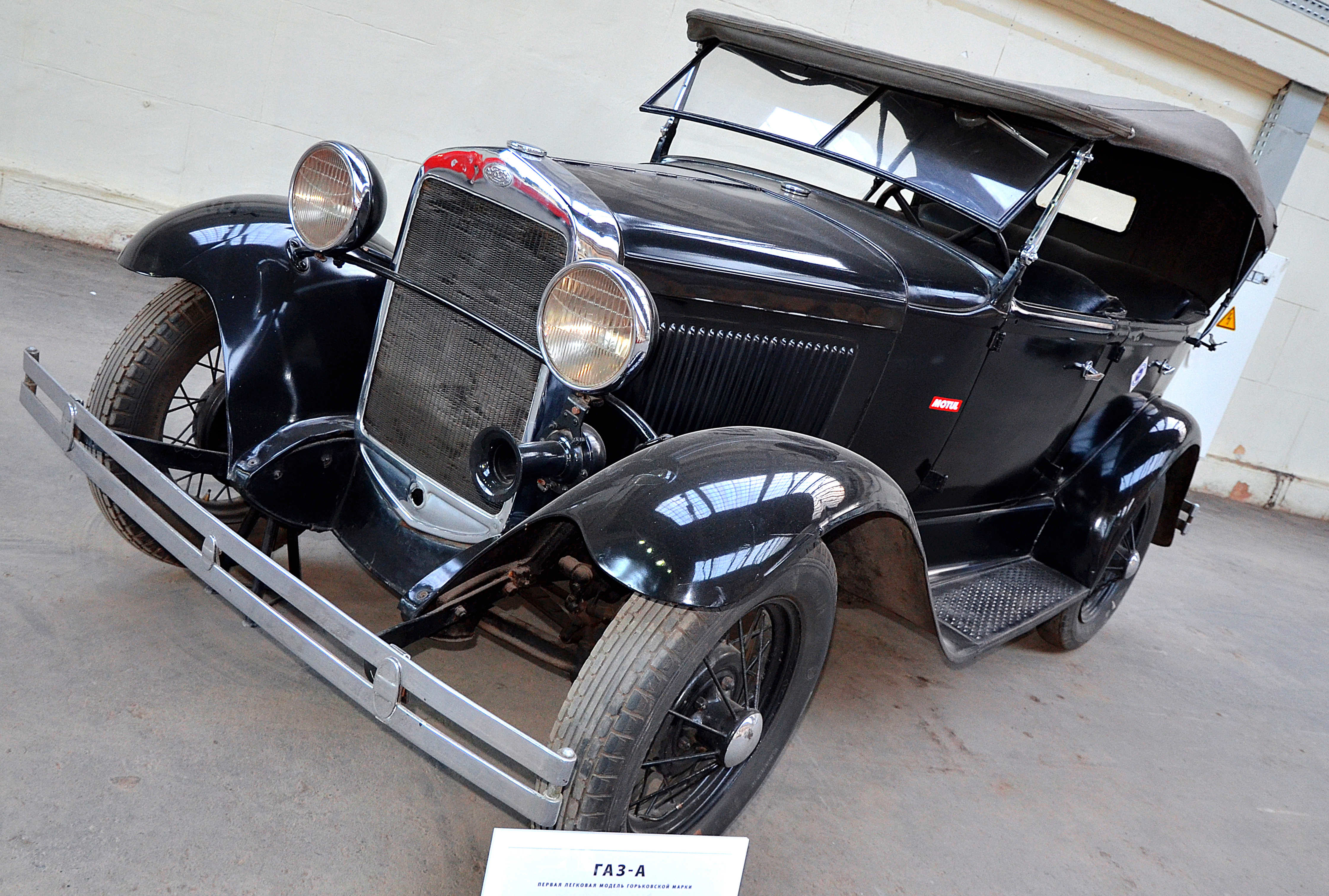 Можно увидеть здесь : You can see here